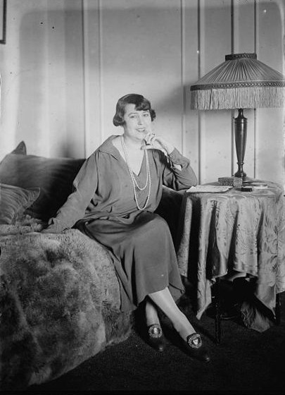 Elvira de Hidalgo (1891 - 1980), Spanish coloratura soprano, singing teacher